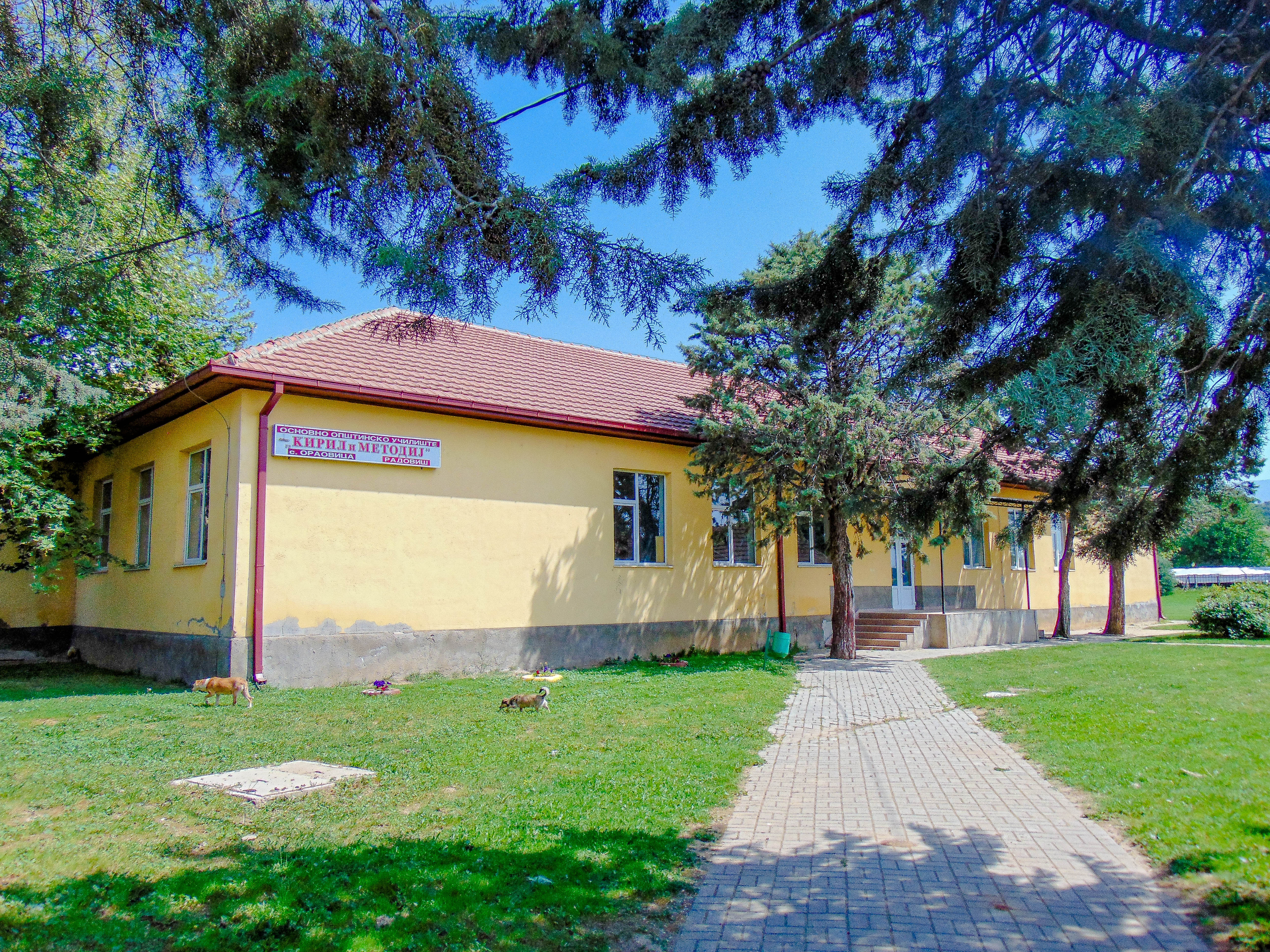 ОУ „Кирил и Методиј“ – Ораовица